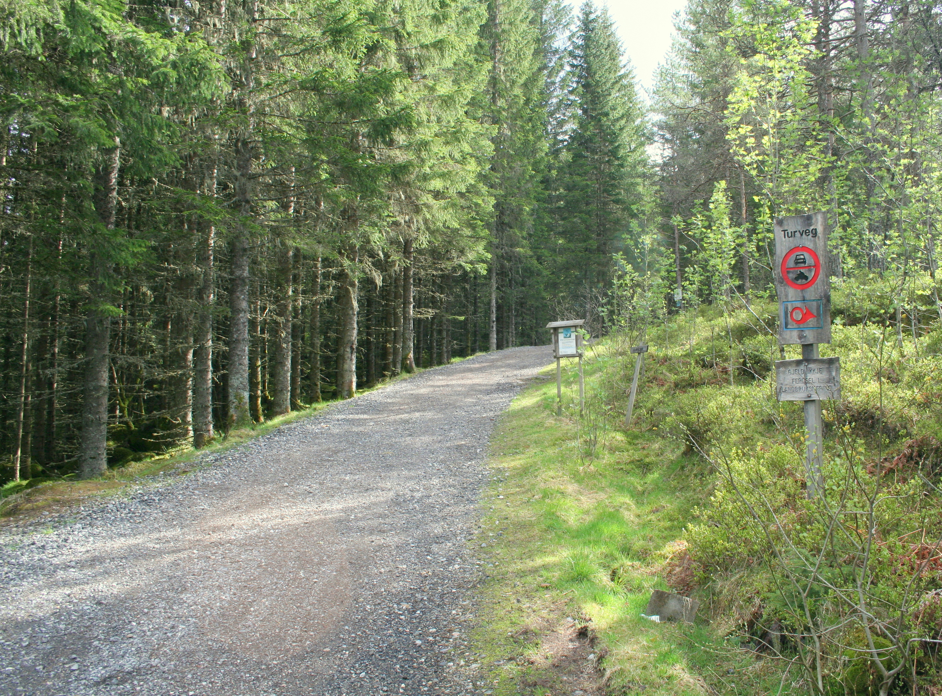 Ved Reset i Førde